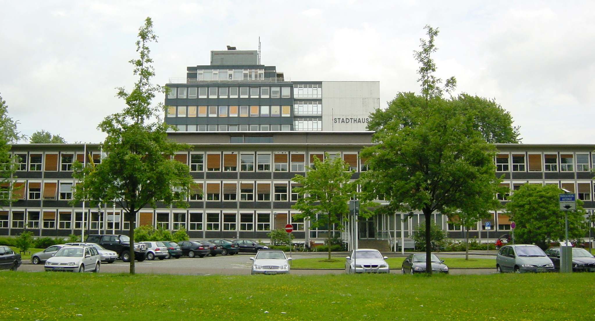 Description: Stadthaus, Konrad-Adenauer-Platz, Krefeld Date: 22.5.2006 Author: DER UNFASSBARE